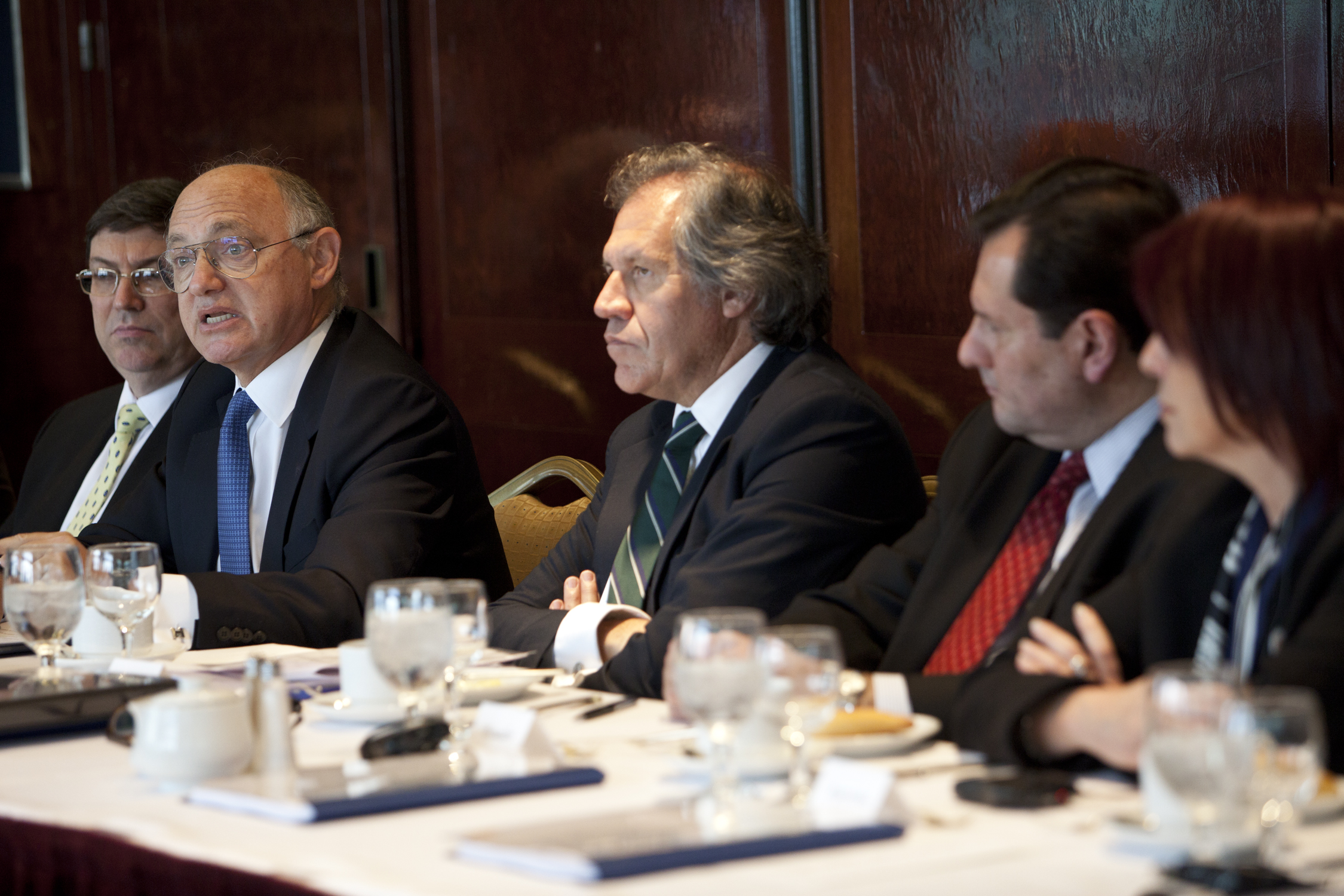 Almuerzo de los 29 embajadores integrantes del del comité de descolonización de las Naciones Unidas, representantes de America Latina y el Caribe, para hablar sobre la cuestión Malvinas. Nueva York, izq a der. canciller cubano Bruno Rodríguez Parrilla, Canciller argentino Héctor Timerman, canciller uruguayo Luis Almagro y el presidente del comité de descolonización, Diego Morejón y la embajadora argentina ante la ONU, María Cristina Perceval .